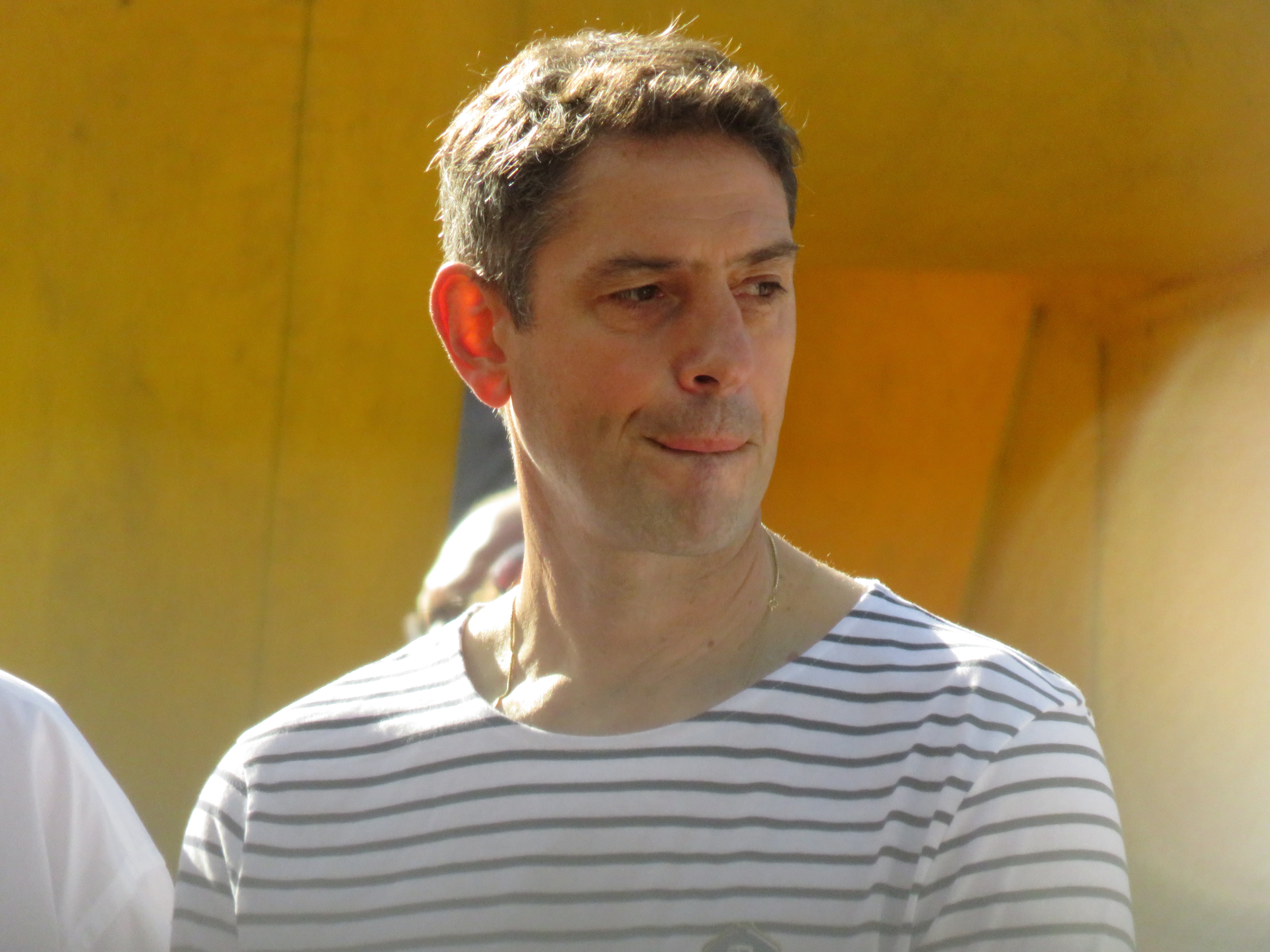 Entraîneur : Antoine Richer